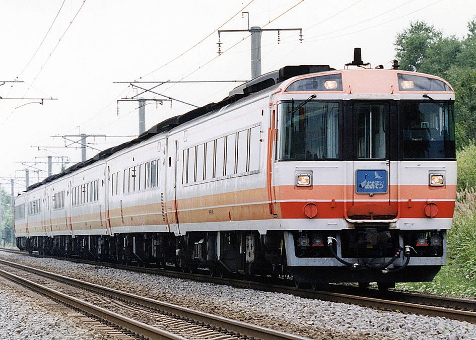 JR北海道 キハ183系特急形気動車 おおぞら 長都駅付近にて